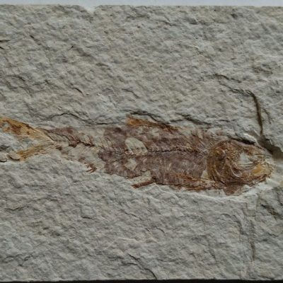 Фосили шарана